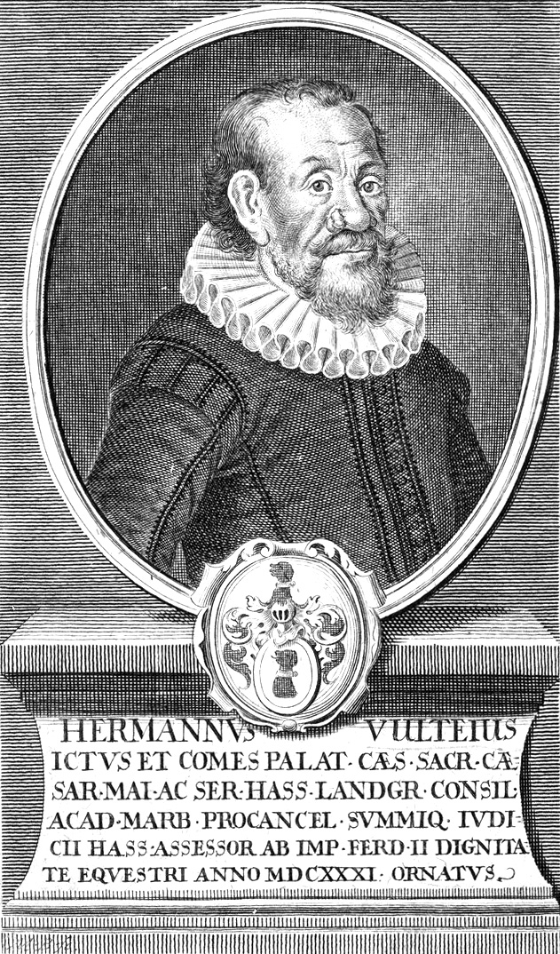 Hermann Vultejus (* 1555 ; † 1634)